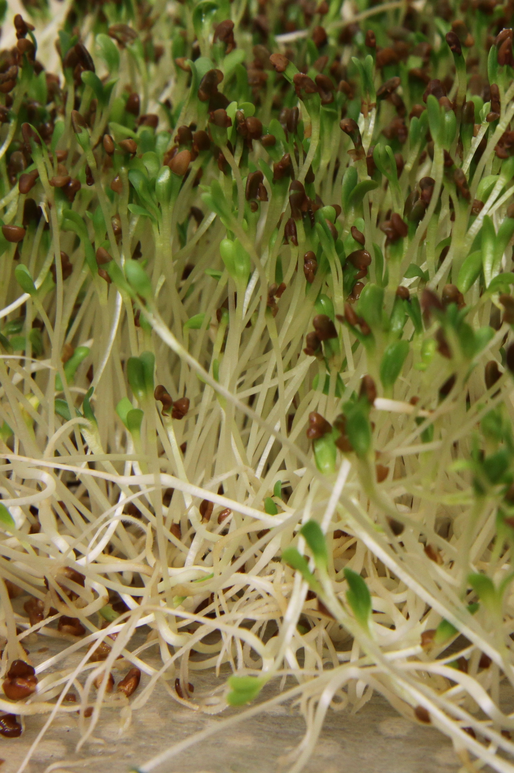 Graines de luzerne bio germées dans un germoir individuel.